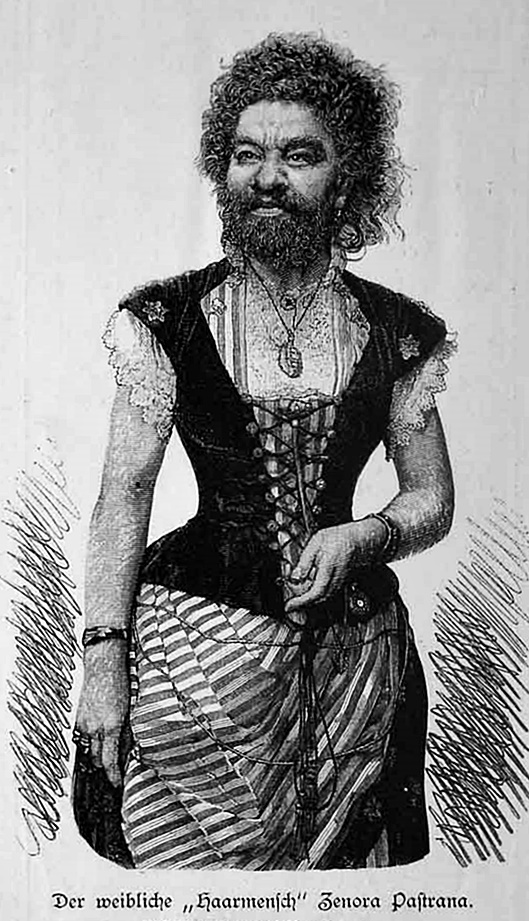 Zenora Pastrana, zweite Frau des Impressarios Theodore Lent, an Hypertrichosis leidend und im Zirkus vorgeführt.